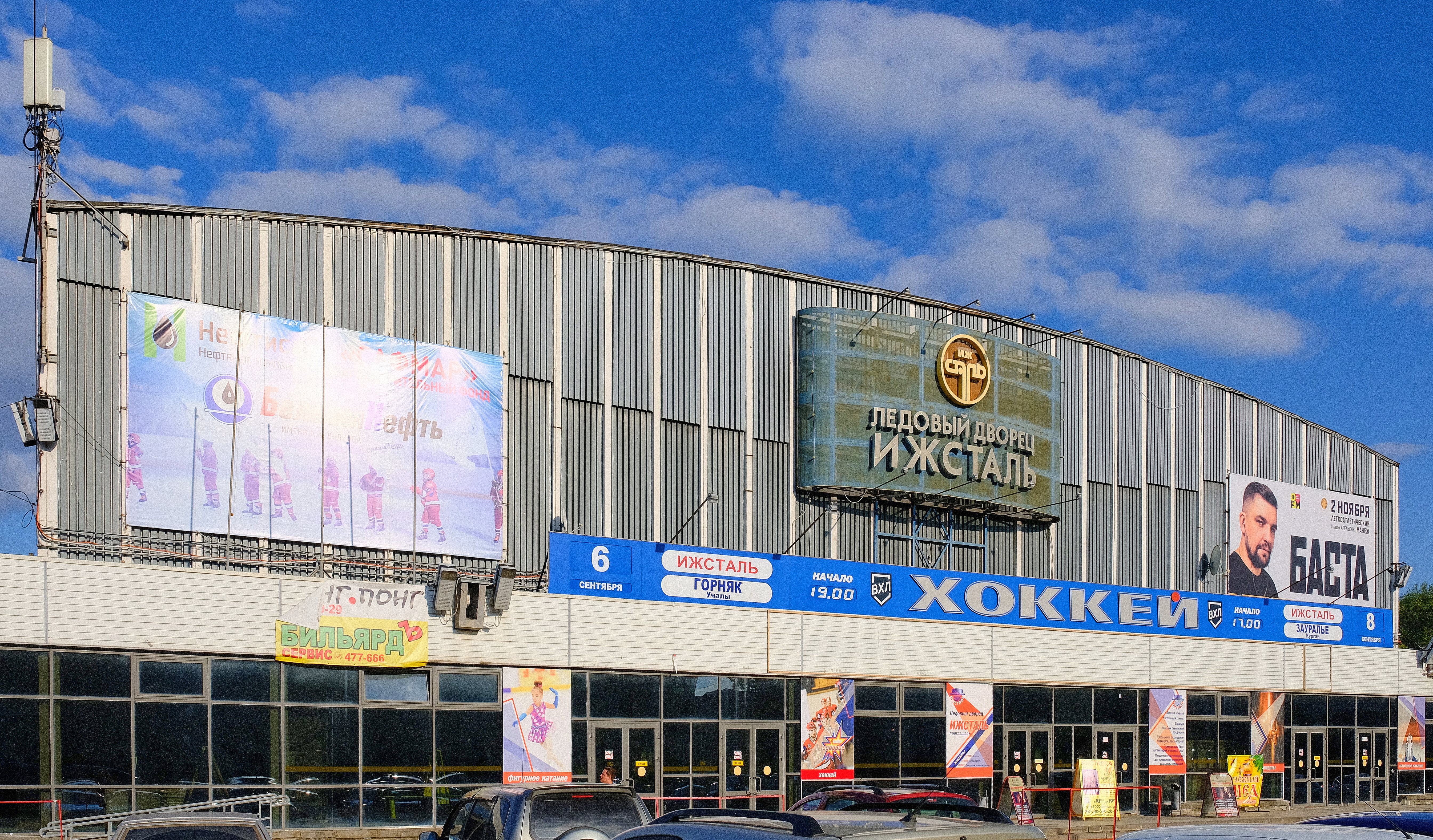 Ледовый дворец "Ижсталь" (Ижевск, Удмуртия)